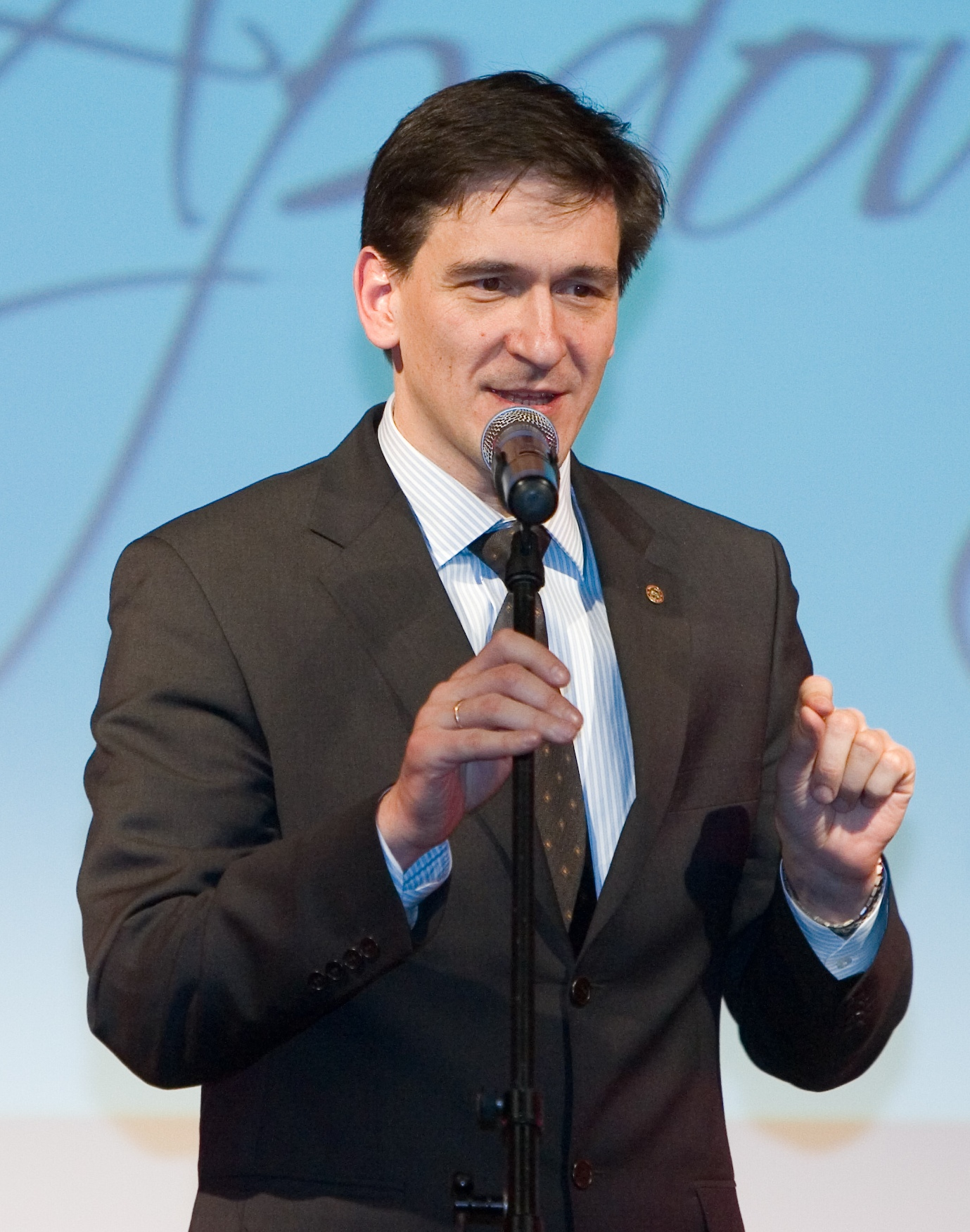 Ūkio ministras Darius Kreivys